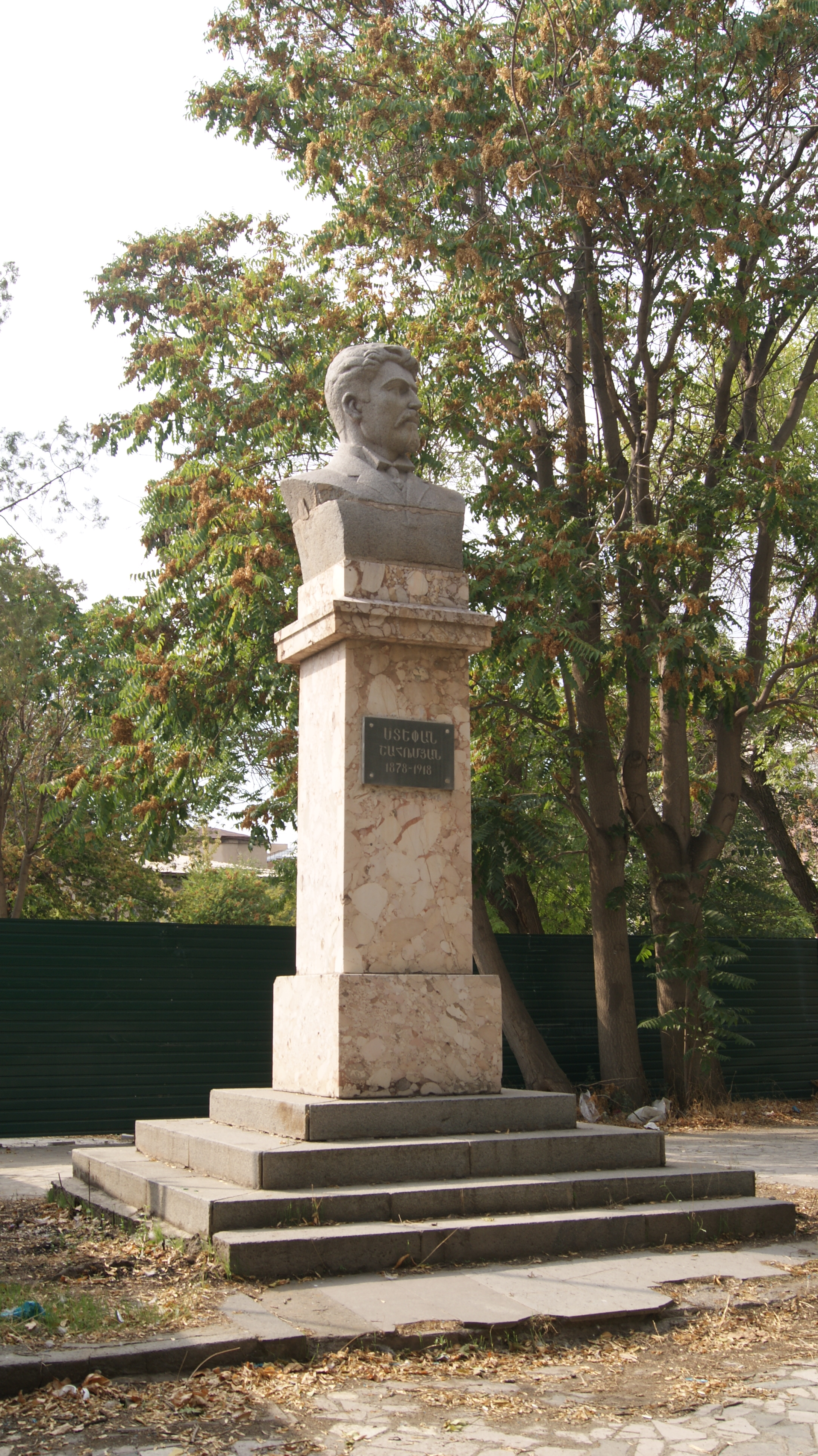 Ստեփան Շահումյանի հուշարձանը Էջմիածնում 2/26